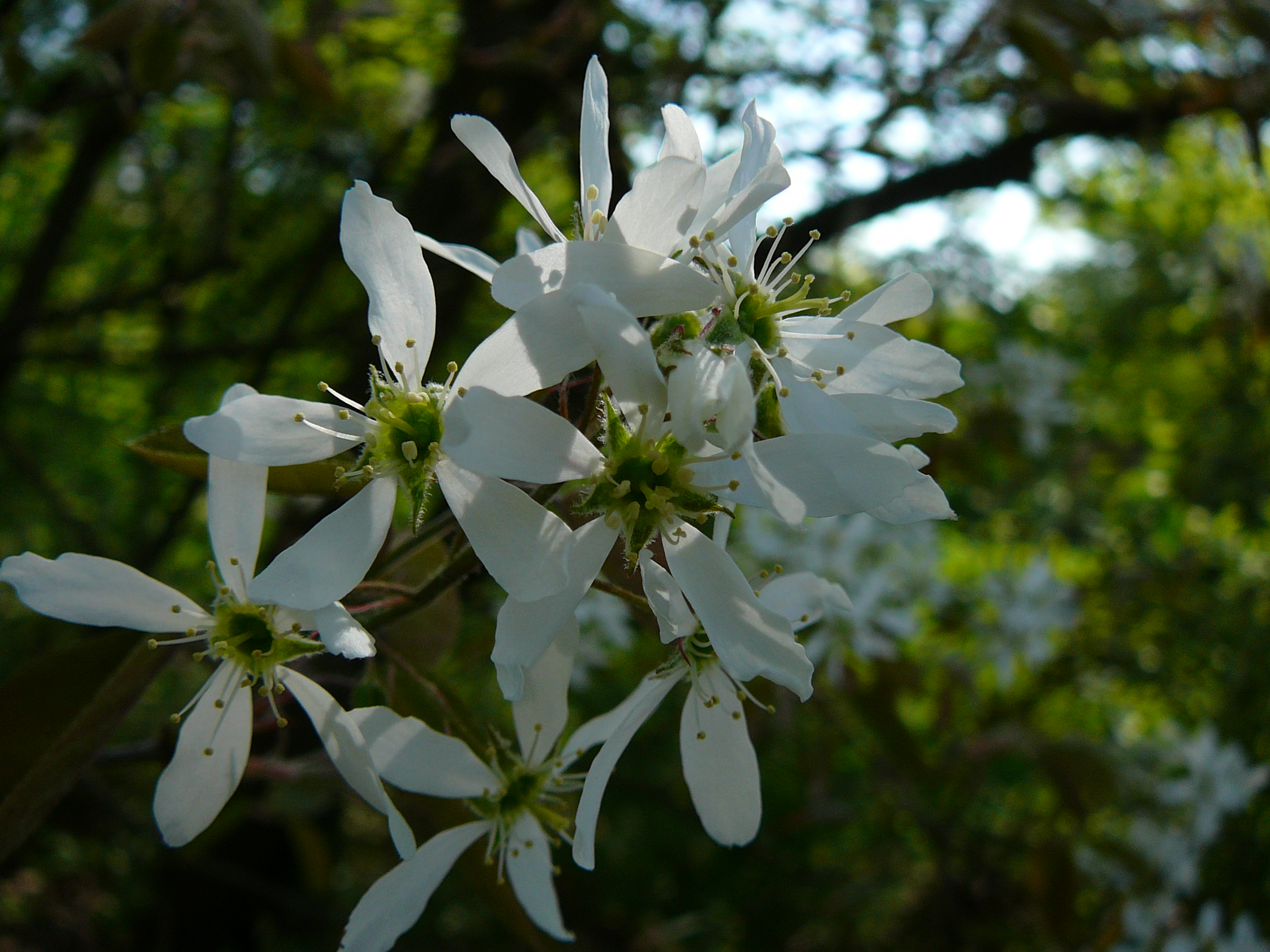 Amelanchier ovalis